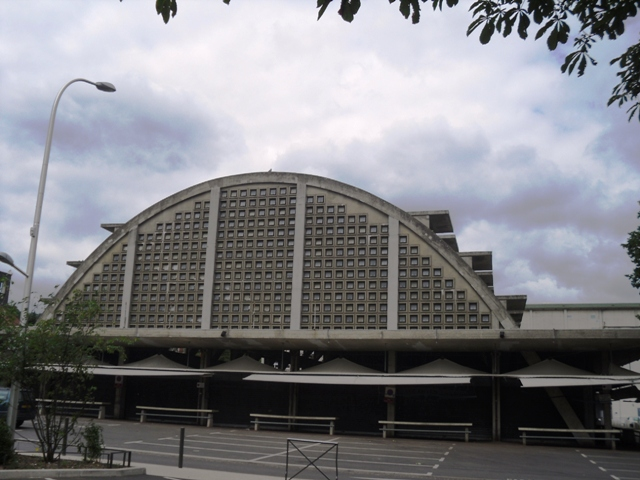 La halle du marché de Juvisy-sur-Orge (91)